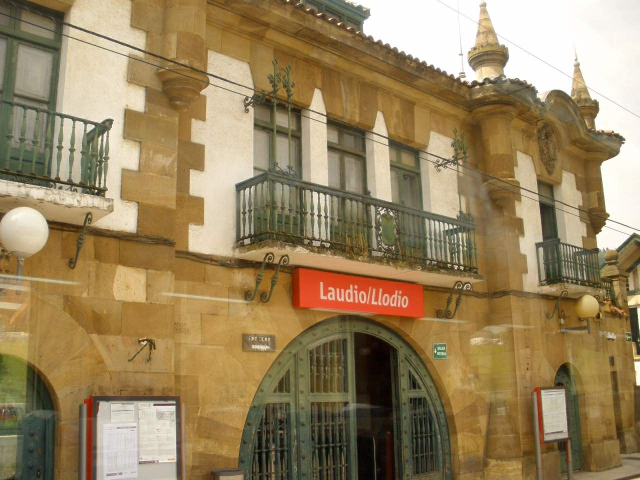 Estación de tren de Laudio/Llodio (Álava).